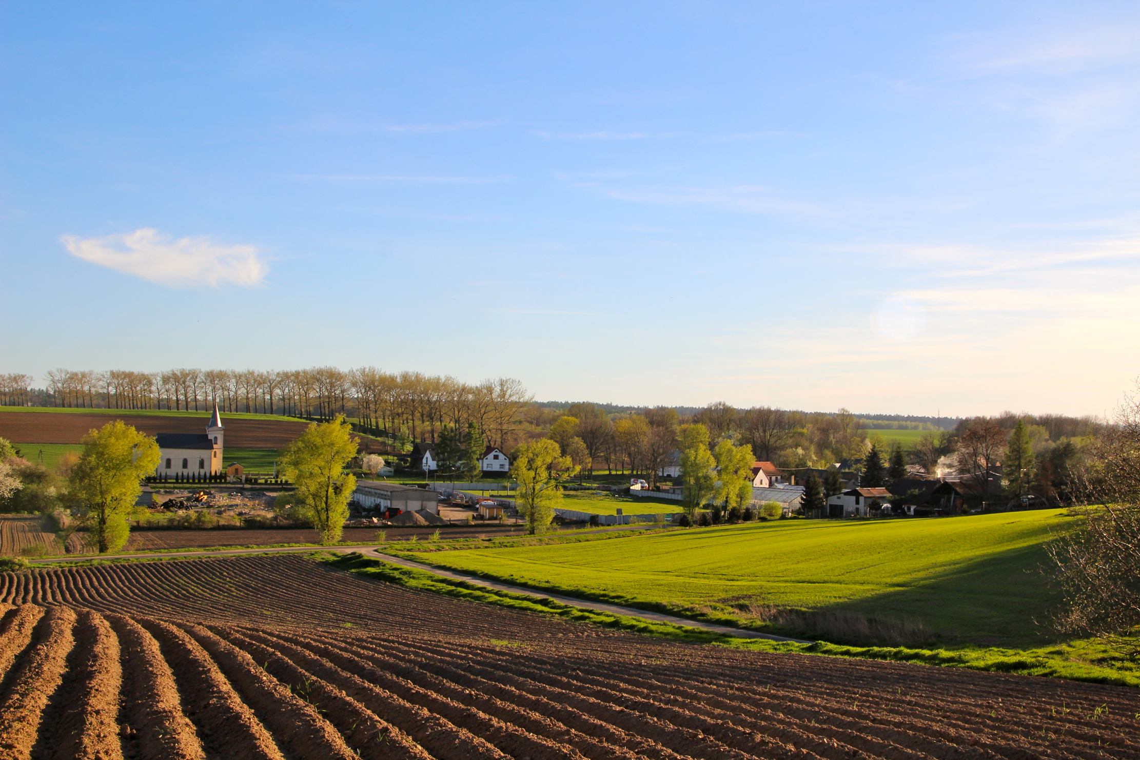 Kietlice - dawna kaplica cmentarna, obecnie rzymskokatolicki kościół filialny pw. św. Józefa, 1881.